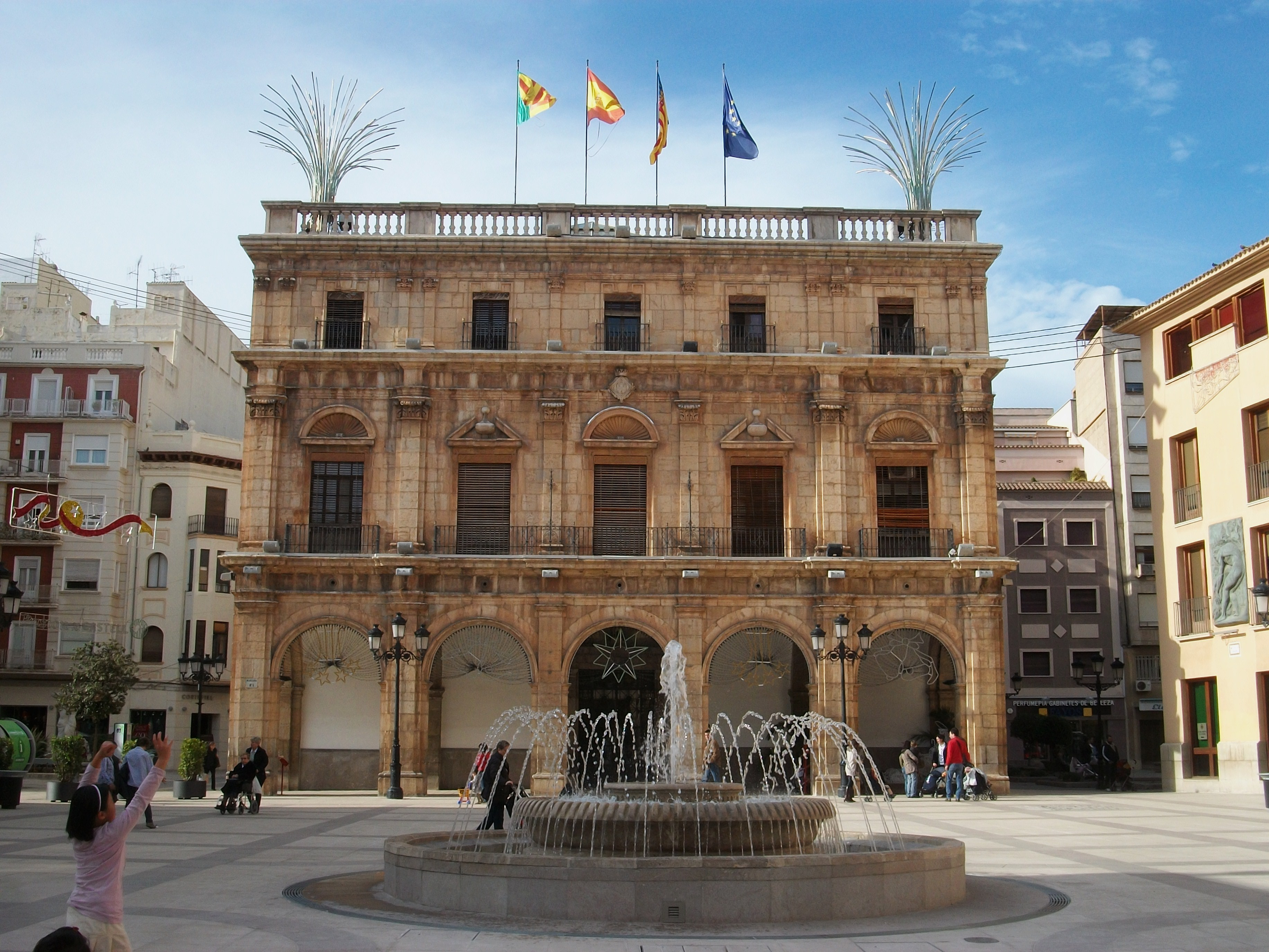 Plaça Major de Castelló de la Plana i ajuntament.